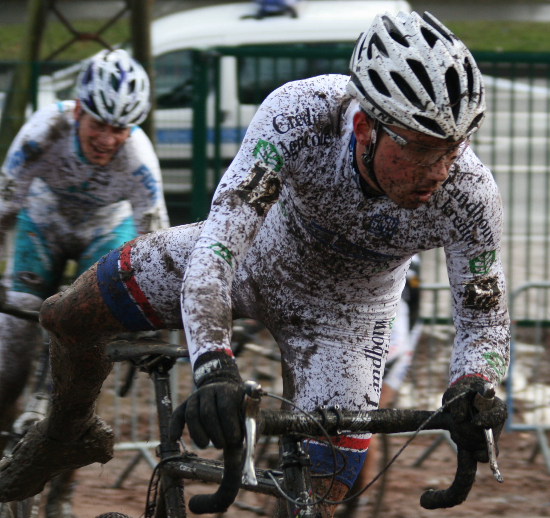 Sven Nys au Grand Prix Lille Métropole 2009